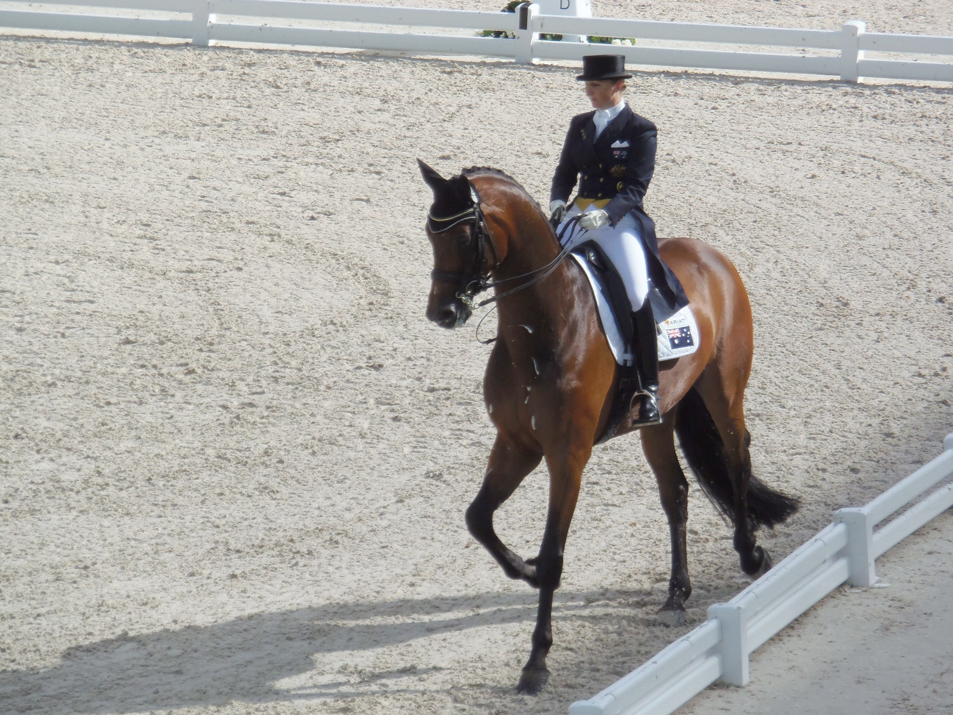 Kristy Oatley en selle sur Ronan 2 lors des Jeux équestres mondiaux, le 26 août 2014 au stade d'Ornano à Caen (Normandie, France).